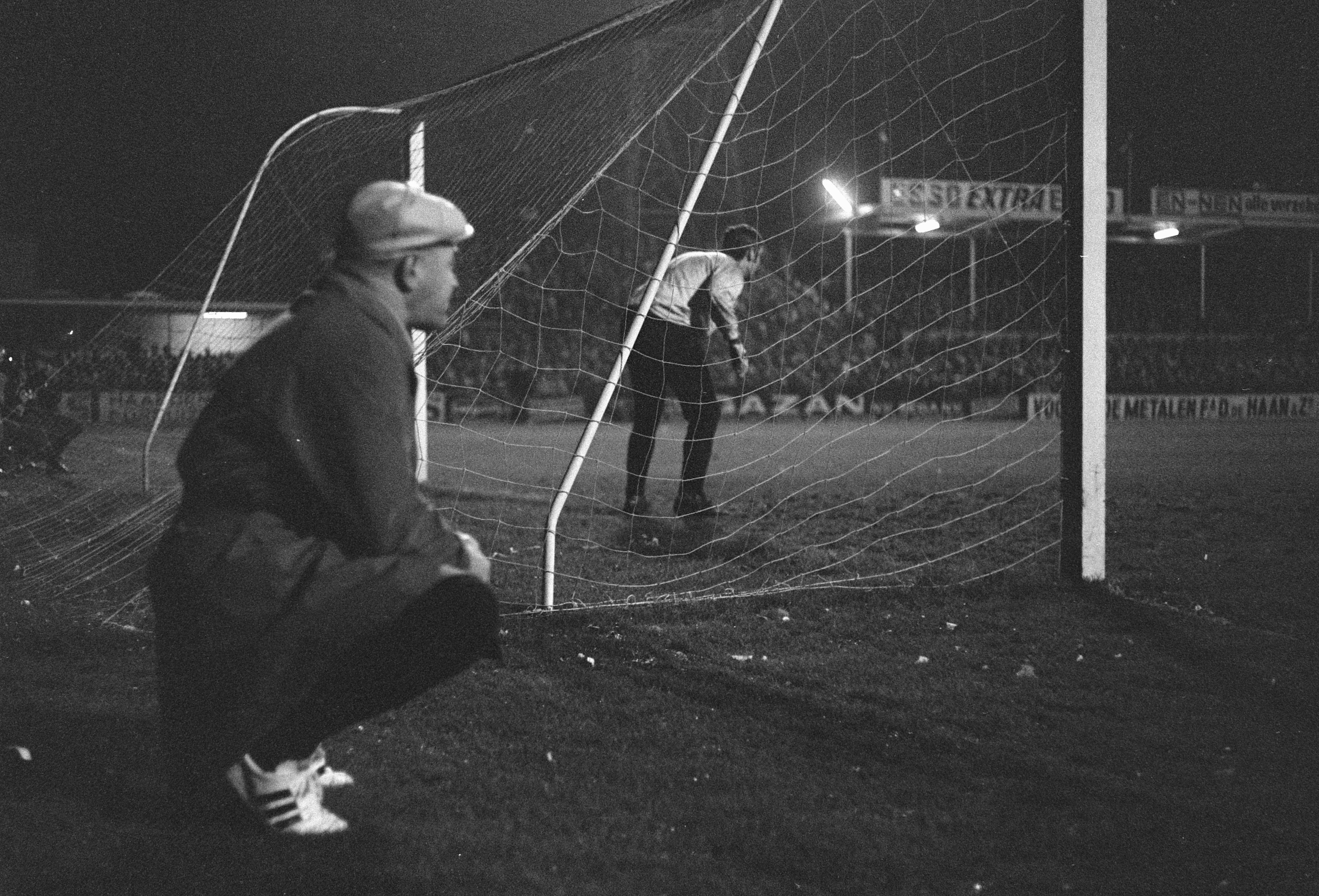 Collectie / Archief : Fotocollectie Anefo Reportage / Serie : [ onbekend ] Beschrijving : Europacup II , ADO-FC Koln 0-1 trainer FC Koln , Merkle Datum : 12 november 1968 Trefwoorden : sport, trainers, voetbal Fotograaf : Koch, Eric / Anefo Auteursrechthebbende : Nationaal Archief Materiaalsoort : Negatief (zwart/wit) Nummer archiefinventaris : bekijk toegang 2.24.01.05 Bestanddeelnummer : 921-8494